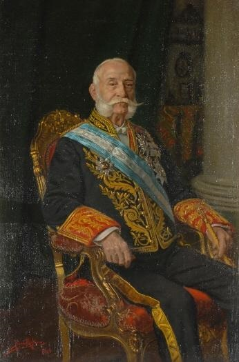 Retrato del aristócrata y político español Narciso García-Loygorri (1837-1905), que ostentó el título de duque de Vistahermosa y fue también senador del Reino de España por derecho propio, embajador de España en Rusia y alcalde de Madrid.